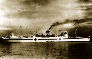 Hikawa Maru Hospital Ship